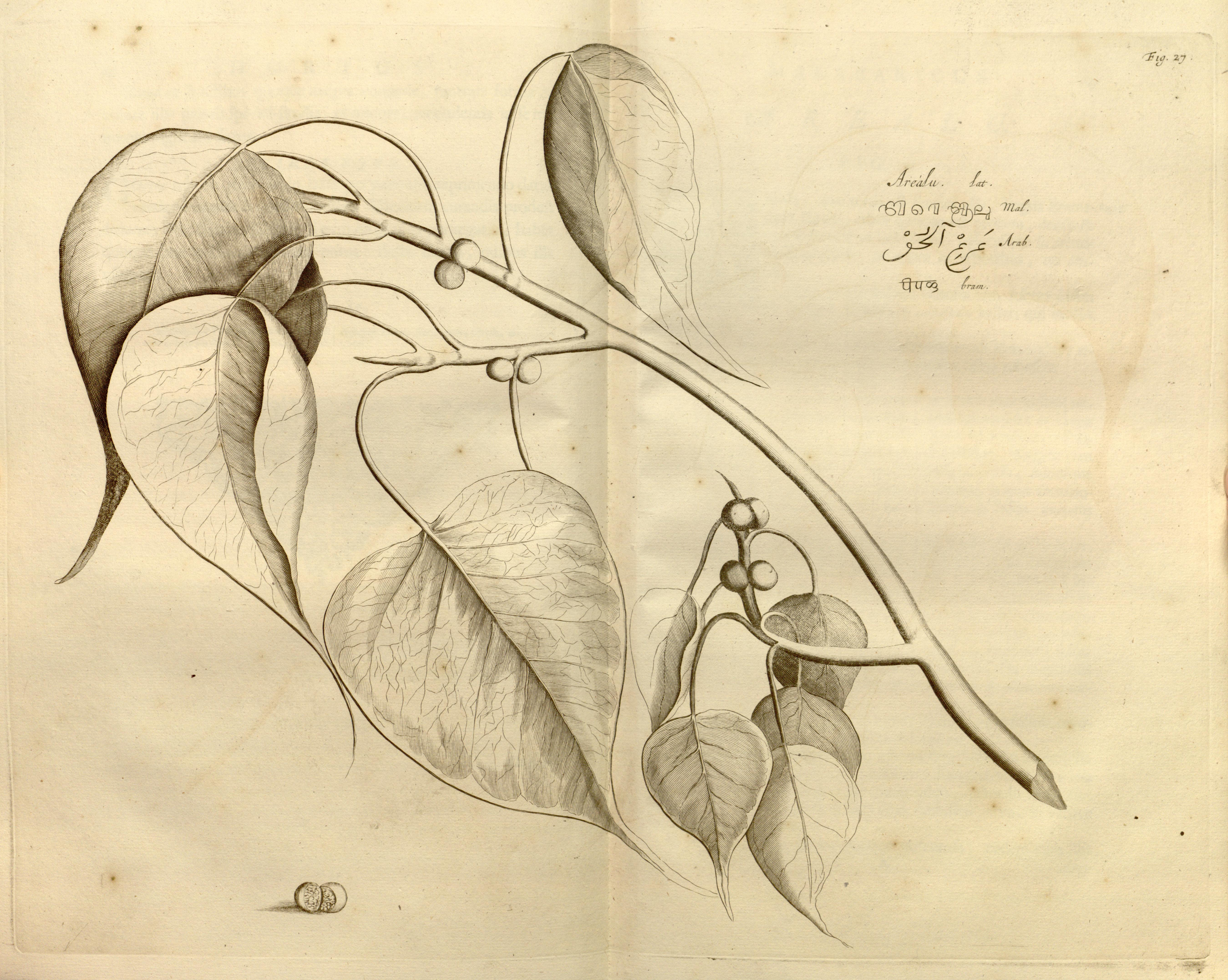 Hortus Indicus Malabaricus :continens regni Malabarici apud Indos cereberrimi onmis generis plantas rariores, Latinas, Malabaricis, Arabicis, Brachmanum charactareibus hominibusque expressas ... /adornatus per Henricum van Rheede, van Draakenstein, ... et Johannem Casearium ... ; notis adauxit, & commentariis illustravit Arnoldus Syen ...